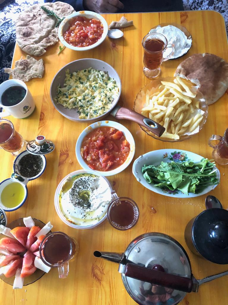 وجبة إفطار